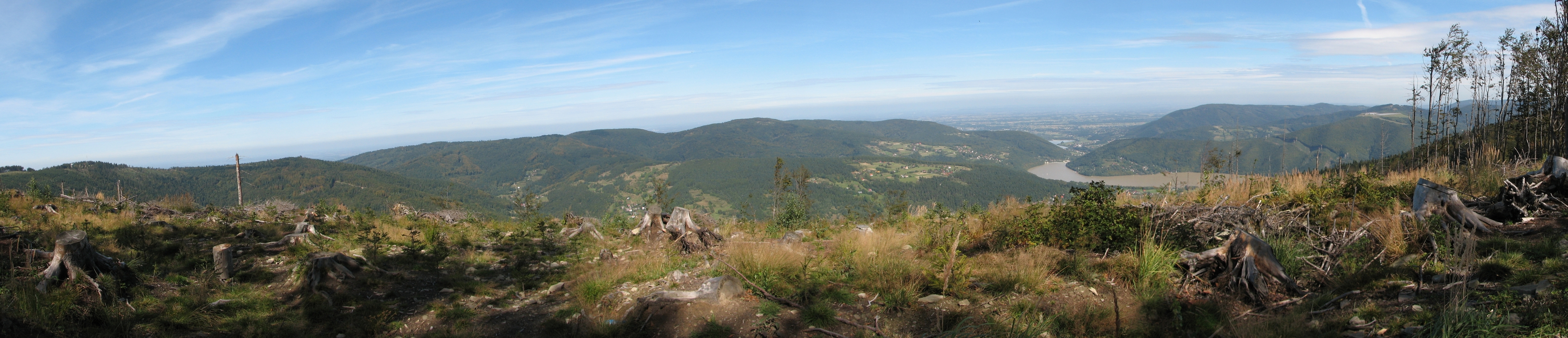 Panorama z Czupla (933 m.n.p.m.), widok na zachodnią część Beskidu Małego